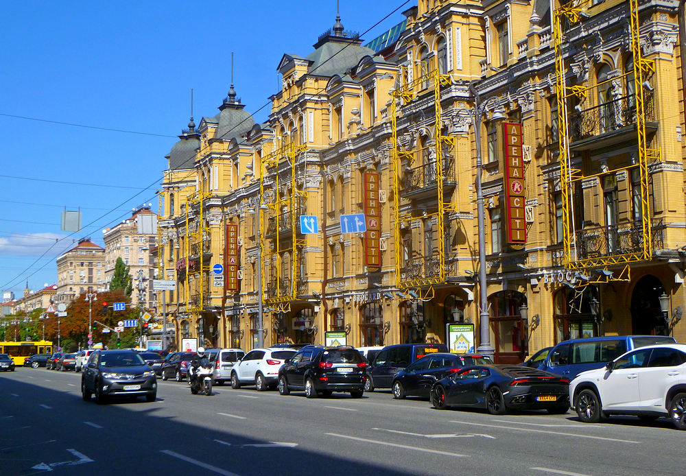 Хрещатик - одна з головних вулиць Києва